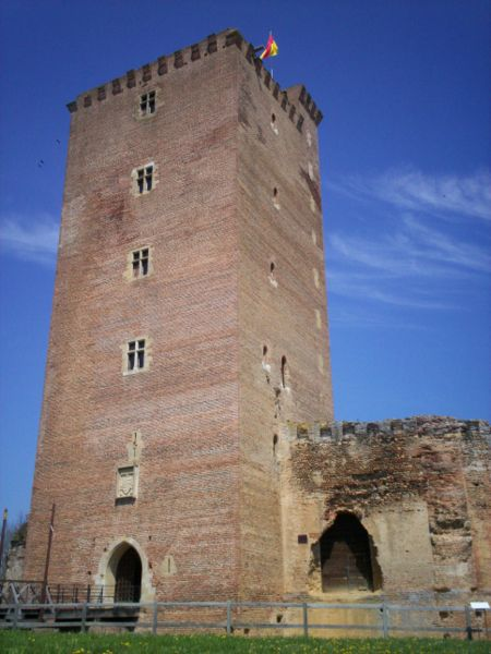 Casteth de Montanèr, bastit per Gaston Fébus